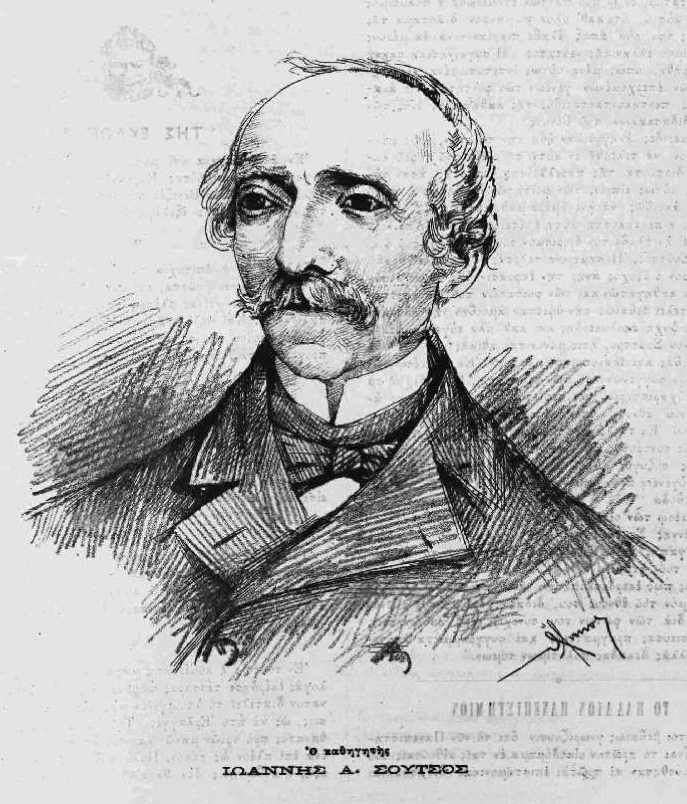 griechischer Universitätsprofessor, 19. Jahrhundert